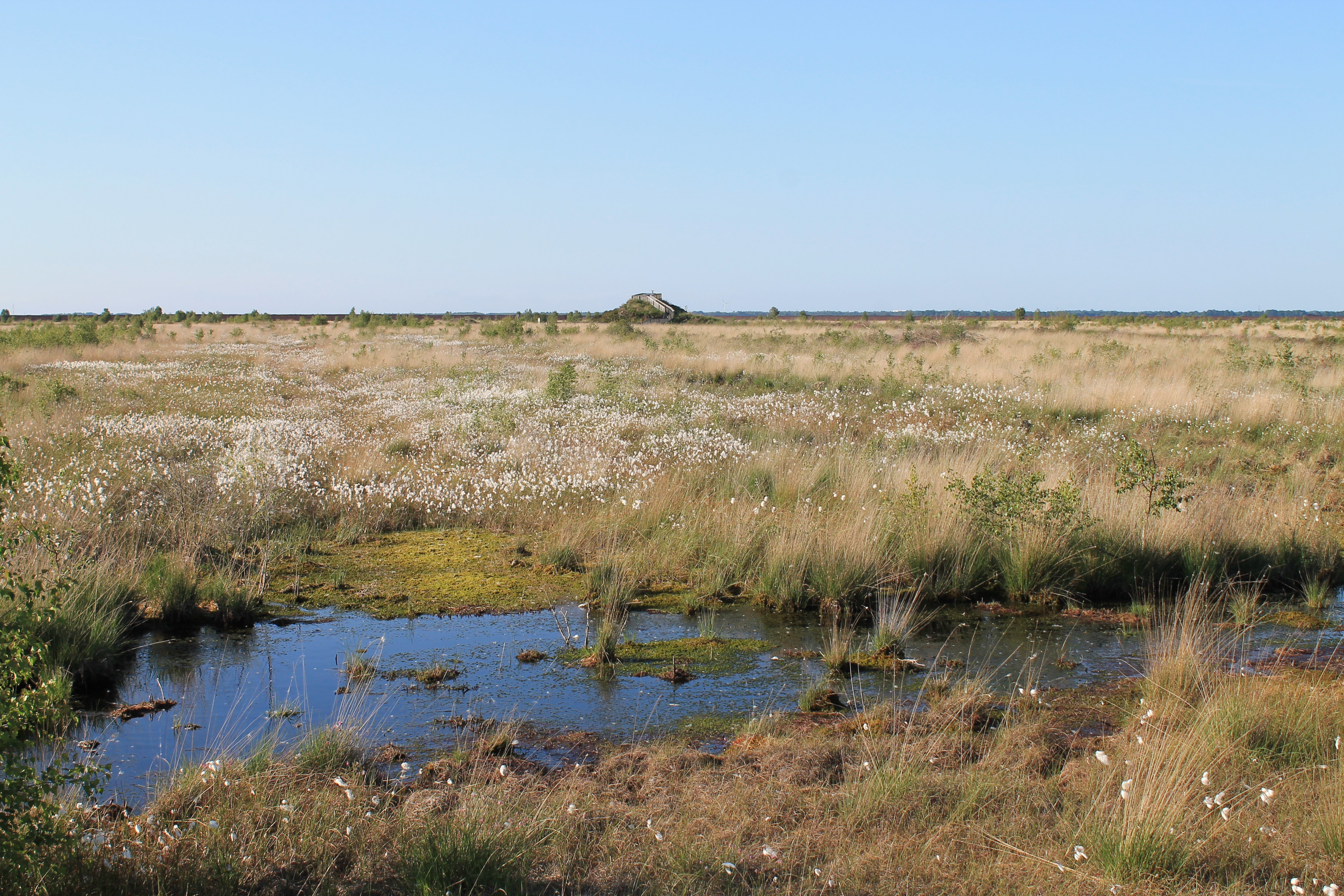 Moor mit Aussichtsturm in der Ferne von der Esterweger Dose; Naturschutzgebiet „Esterweger Dose“